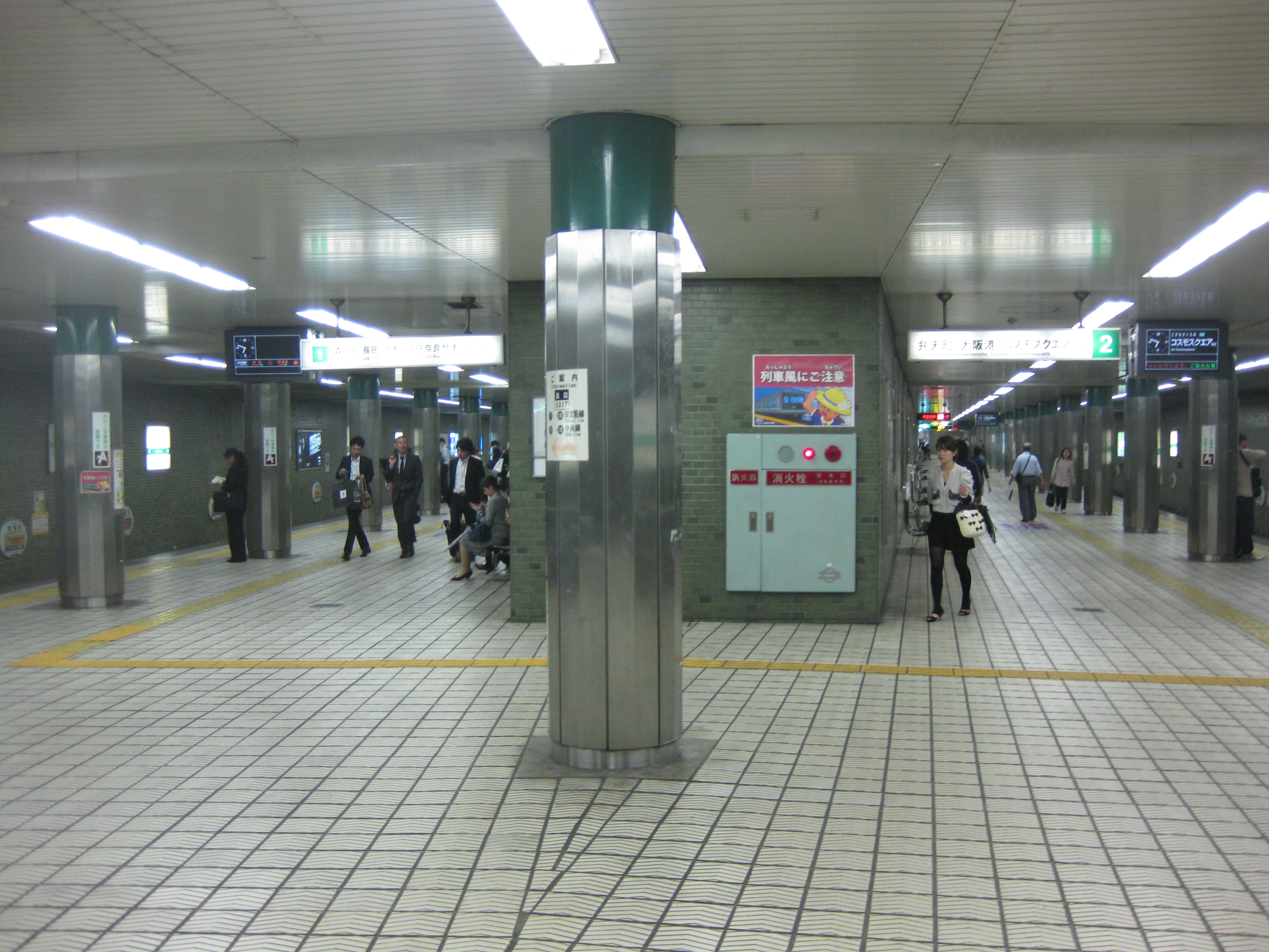 大阪市営地下鉄中央線本町駅プラットホーム